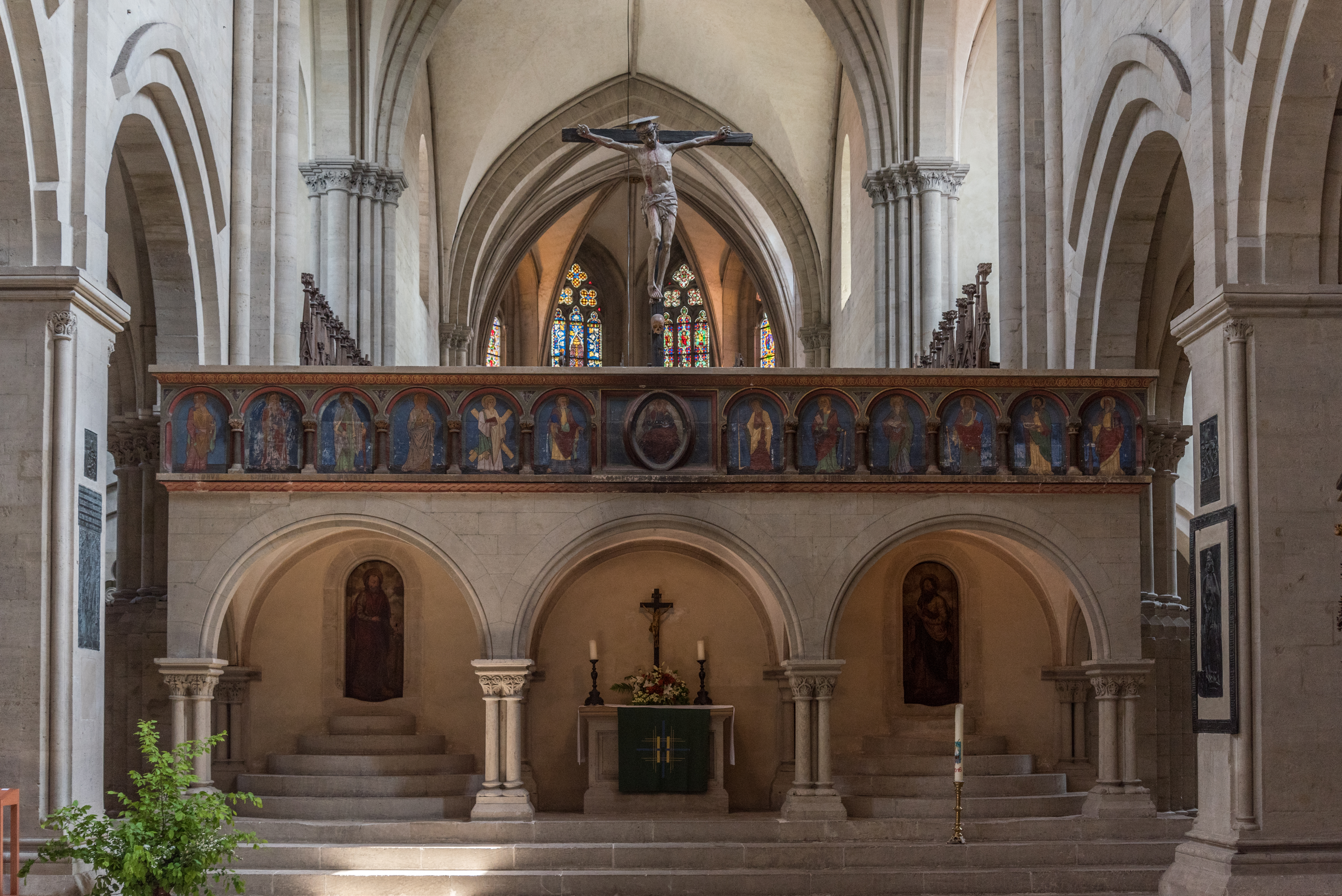 Naumburg an der Saale, Dom, Ostlettner